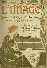 Page couverture de L'Image, avril 1897